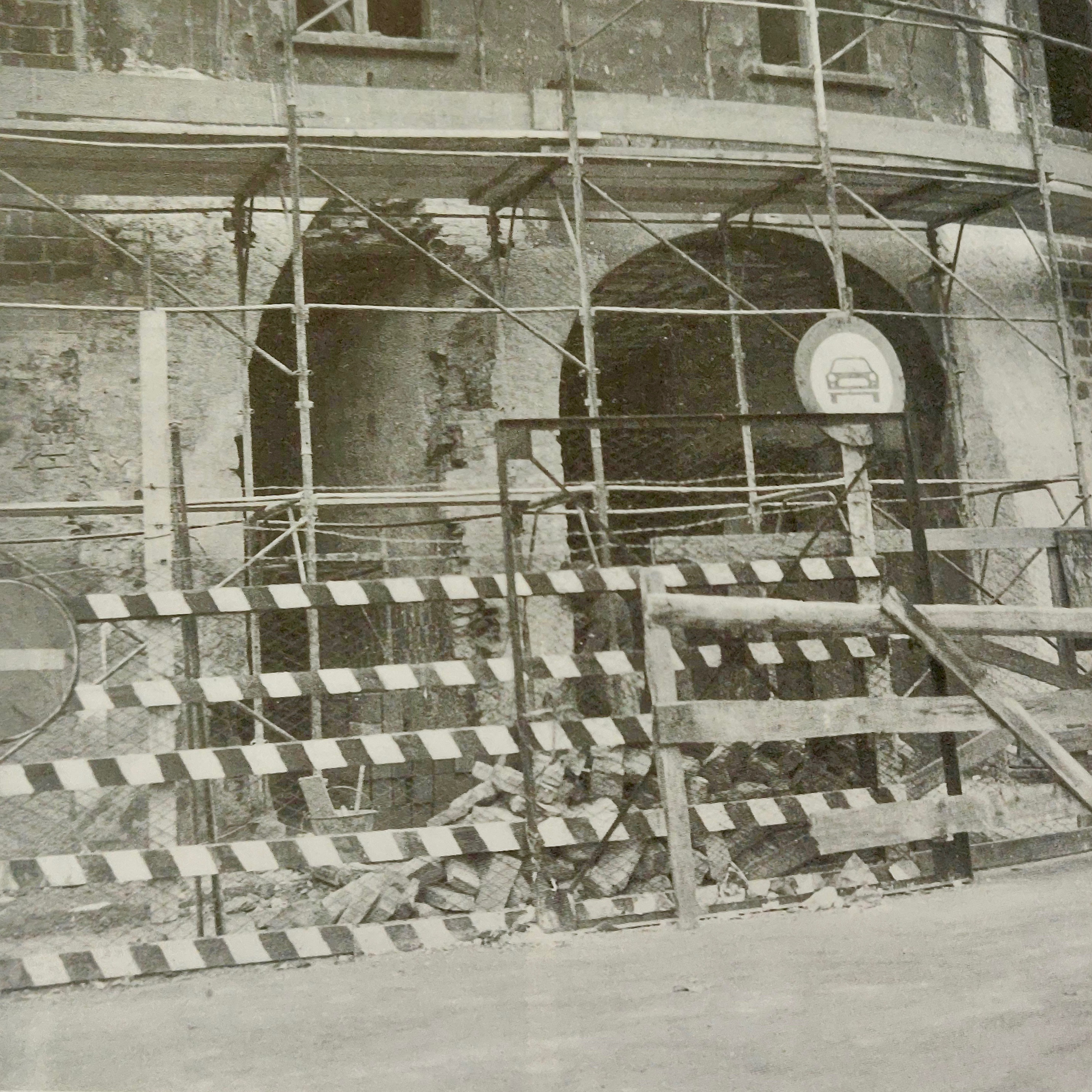 L'ingresso meridionale del castello di Ghedi, annesso alla casa comunale e riapparso nella sua originaria grandezza durante i restauri del Municipio; marzo 1981